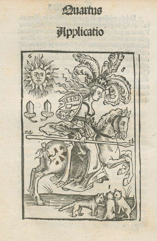 Spielkarte als didaktische Erinnerungshilfe